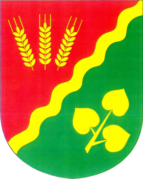 Znak obce Svéradice